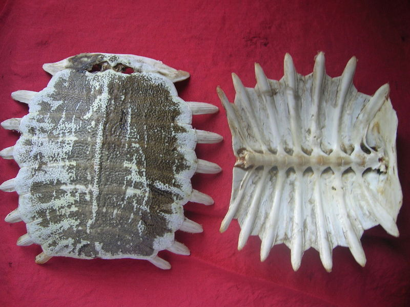 Matière médicale de la pharmacopée chinoise traditionnelle